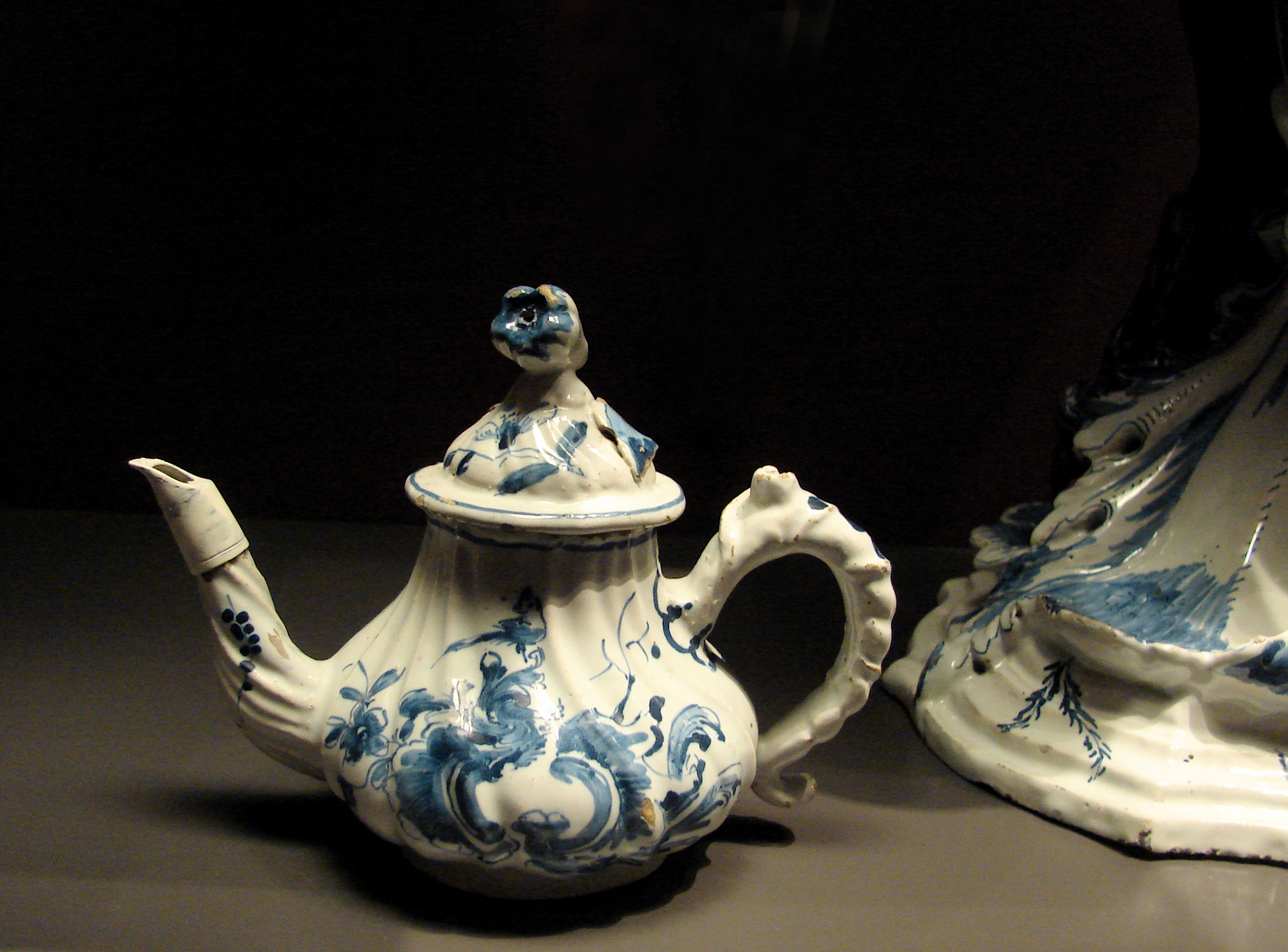 Fajance i udpræget rokoko fra Herrebøfabrikken (Herreböe Fajancefabrik) i Norge, 1700-tallet, Nationalmuséet i København